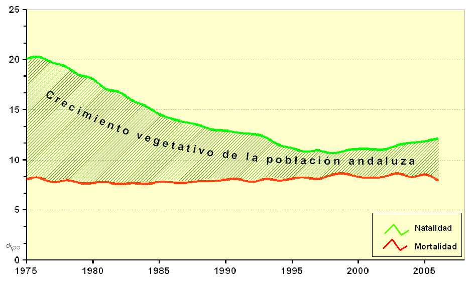 Evolución de la Natalidad, Mortalidad y Crecimiento Natural en Andalucía